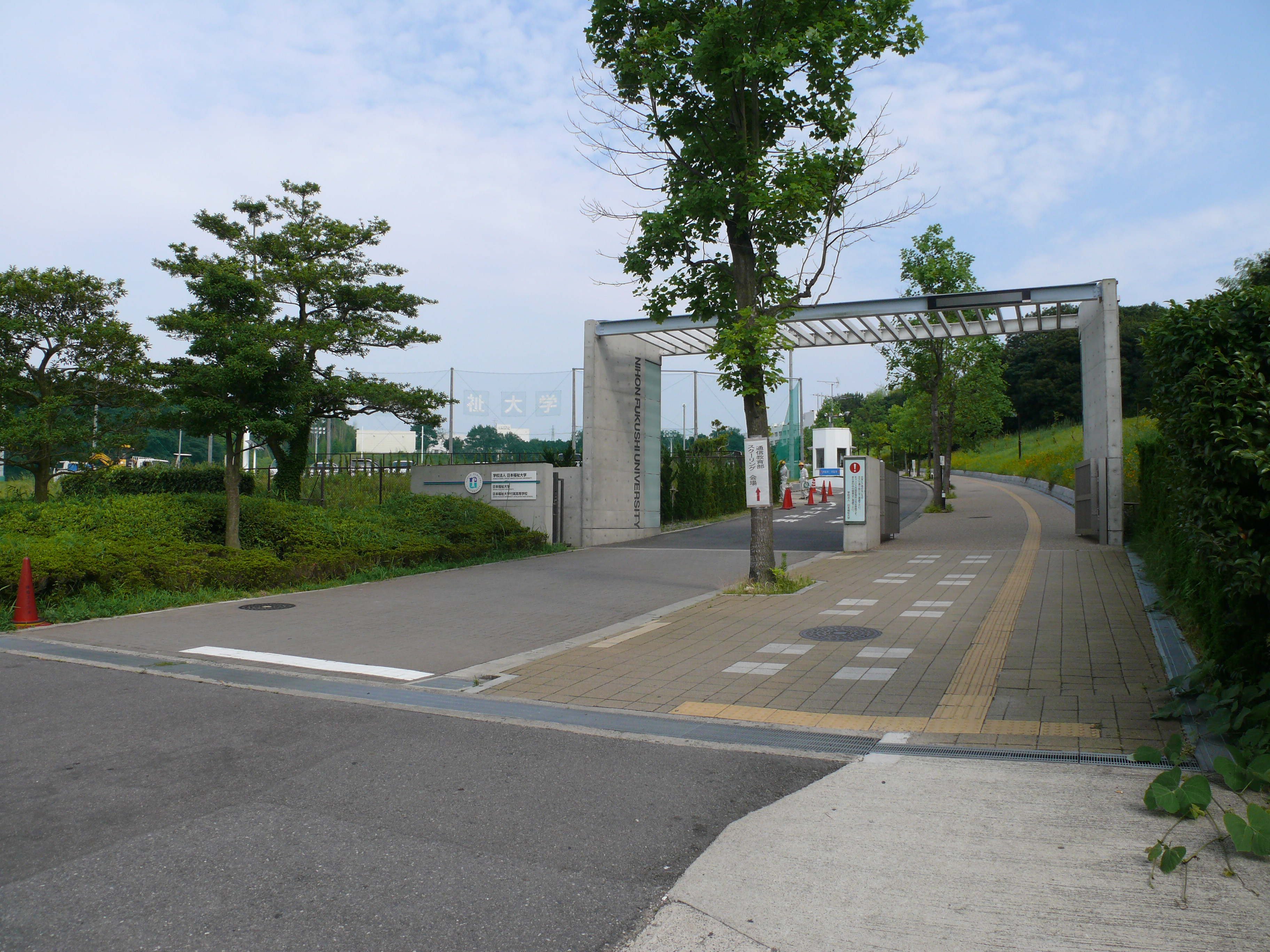 愛知県知多郡美浜町にある日本福祉大学の本部（美浜キャンパス）